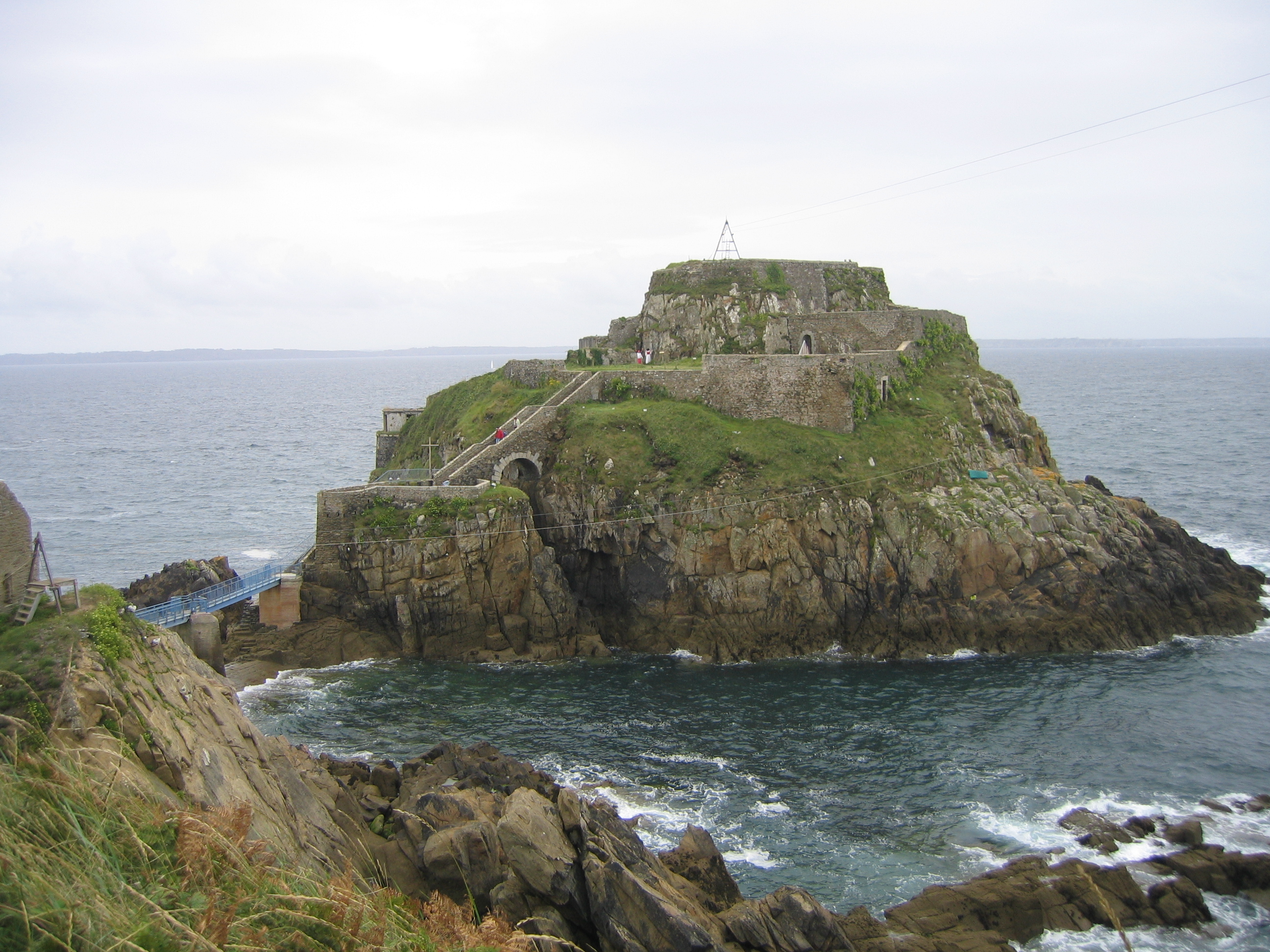 Fort de Berthaume